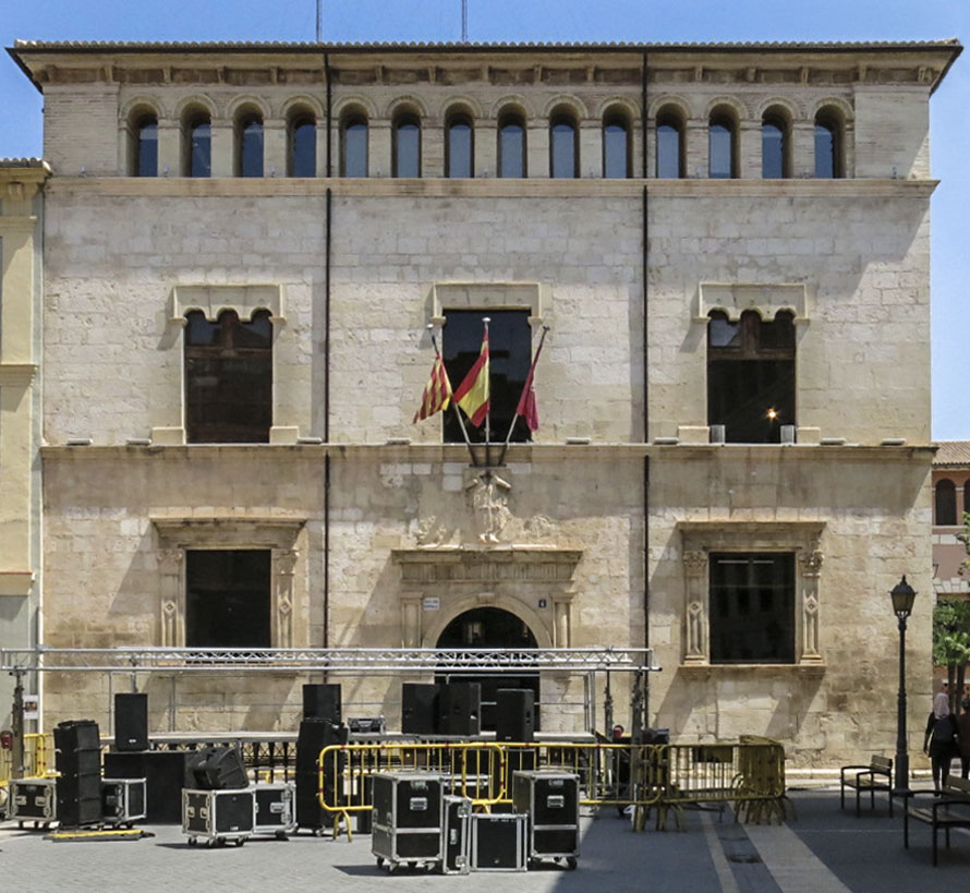 Projecte de col·laboració de l'Arxiu Ismael Latorre Mendoza amb Wikimedia Commons i Amical Wikimedia.